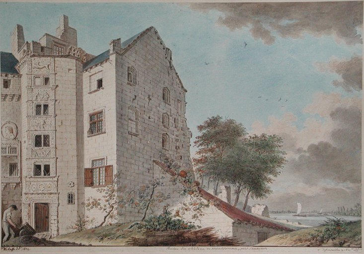 Jean-Jacques Delusse est un dessinateur et peintre français né à Paris le 14 mars 1758, mort à Saintes le 28 novembre 1833.